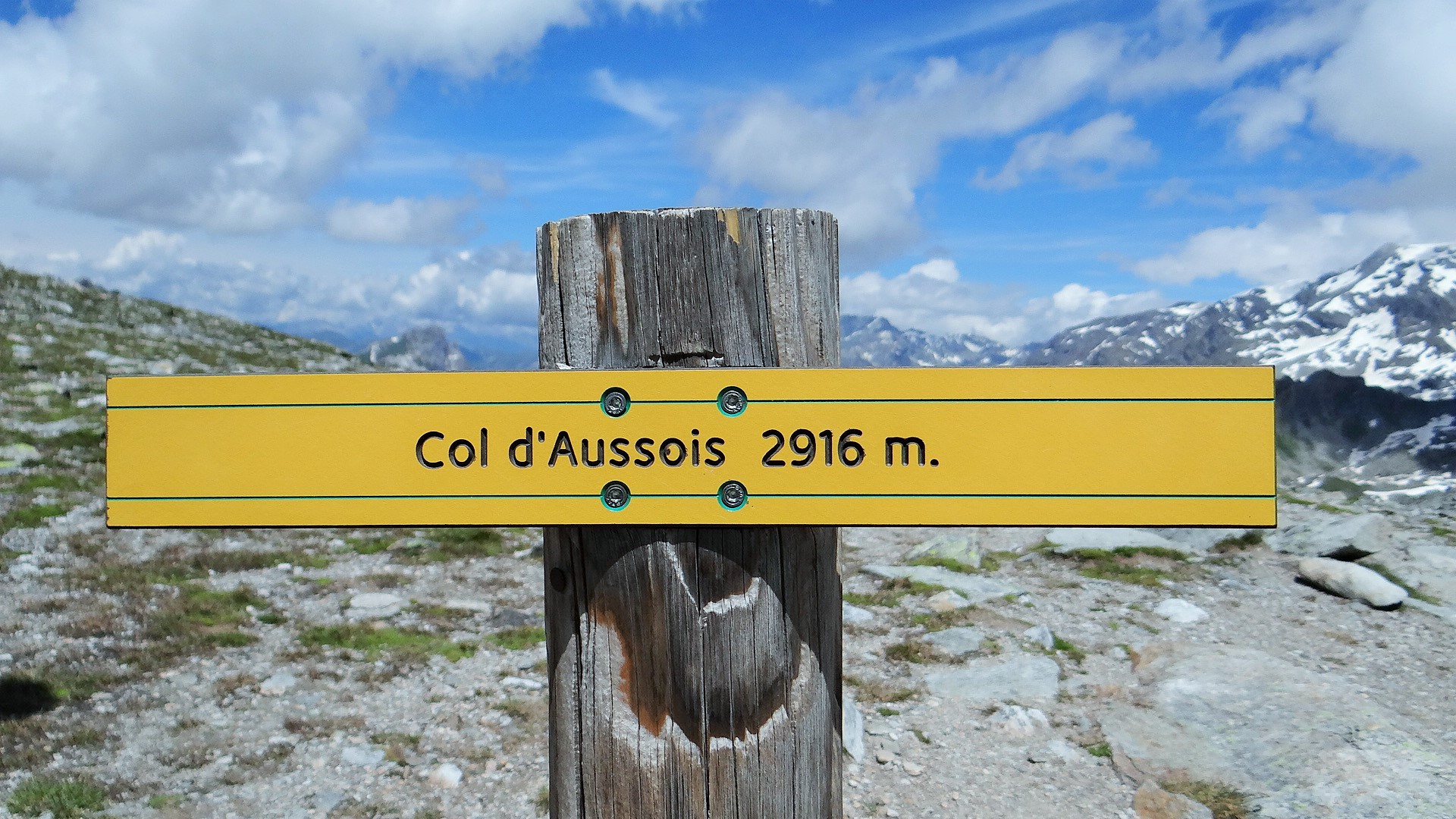 Panneau col d'Aussois(2916m)